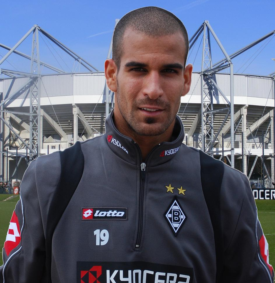 Gal Albermann